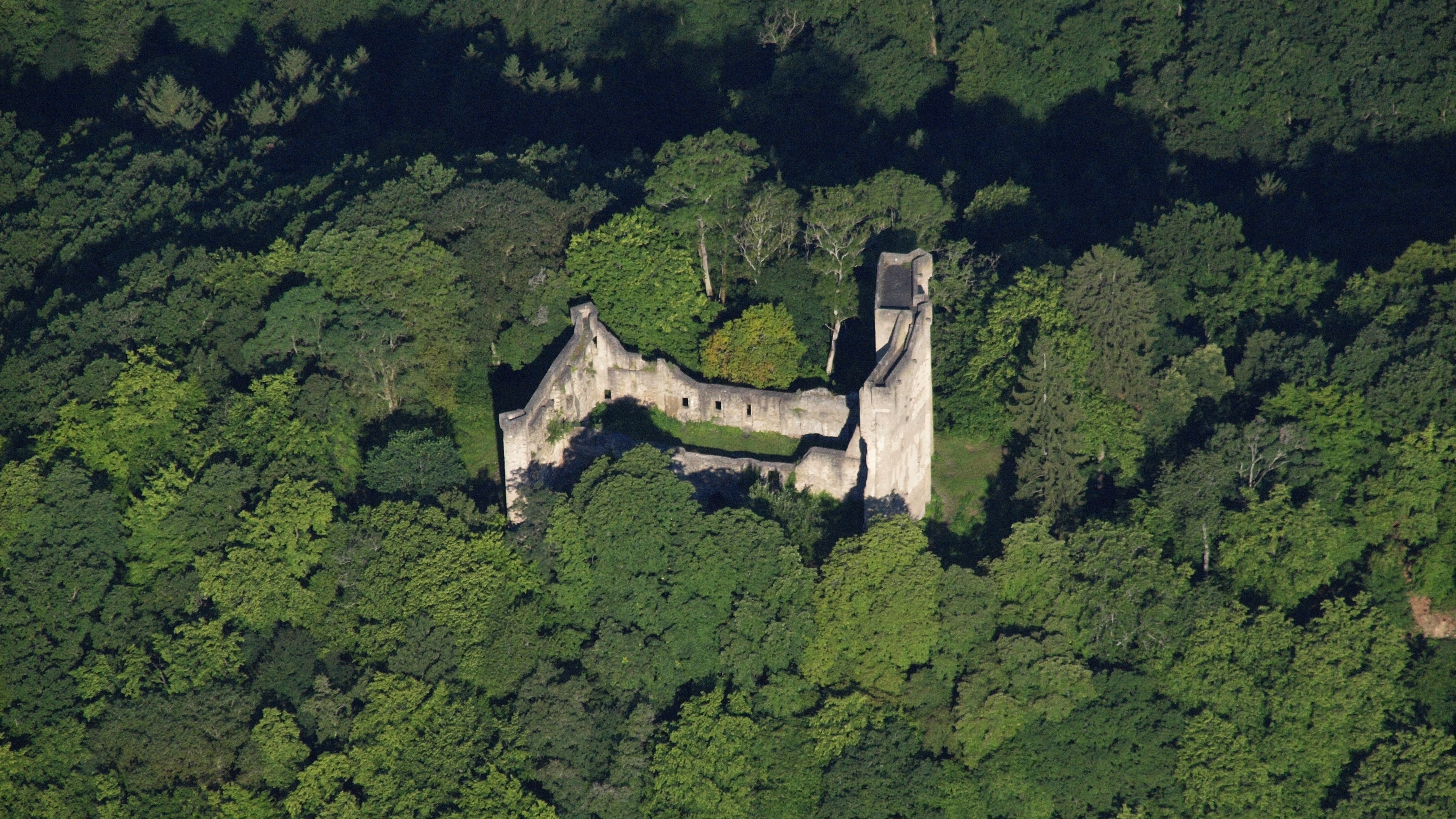 Die Sporkenburg südöstlich von Eitelborn: Luftaufnahme